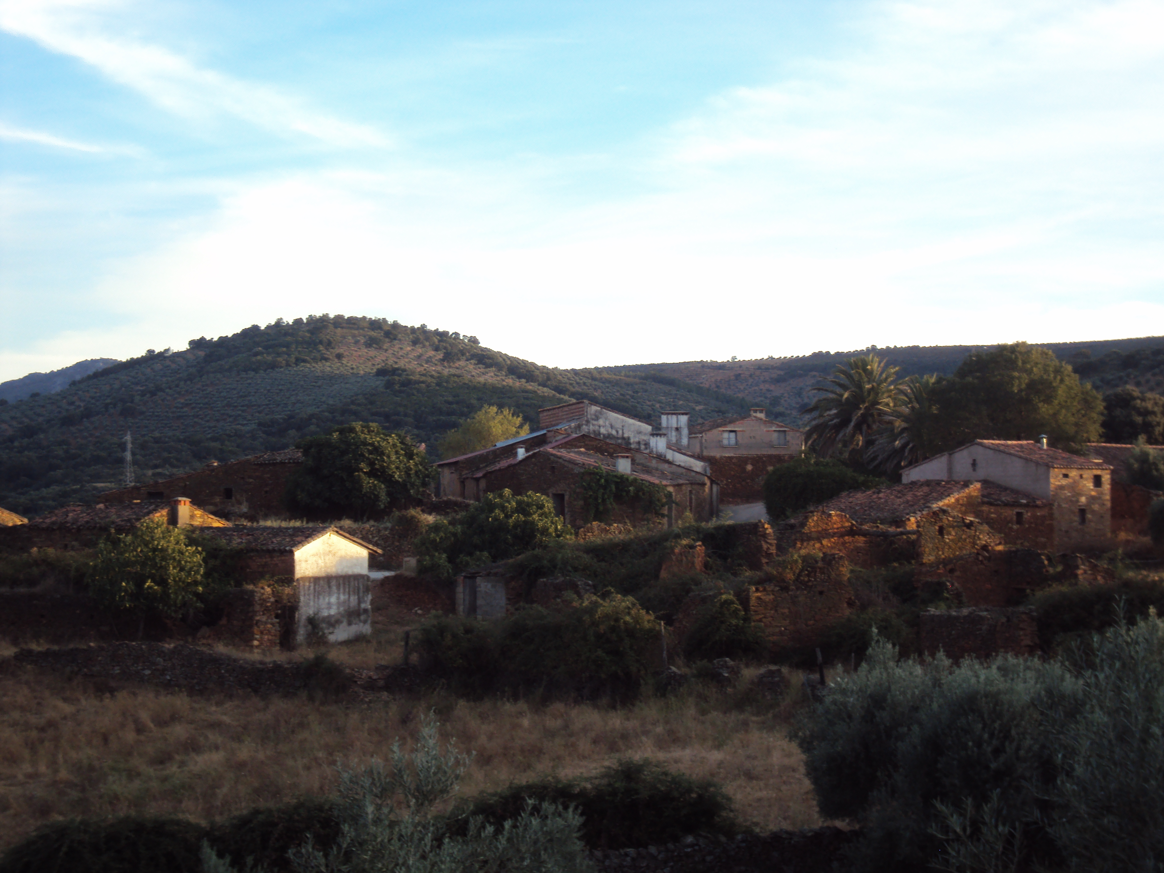 Pueblo deshabitado de La Avellaneda, en Cáceres. (España.)